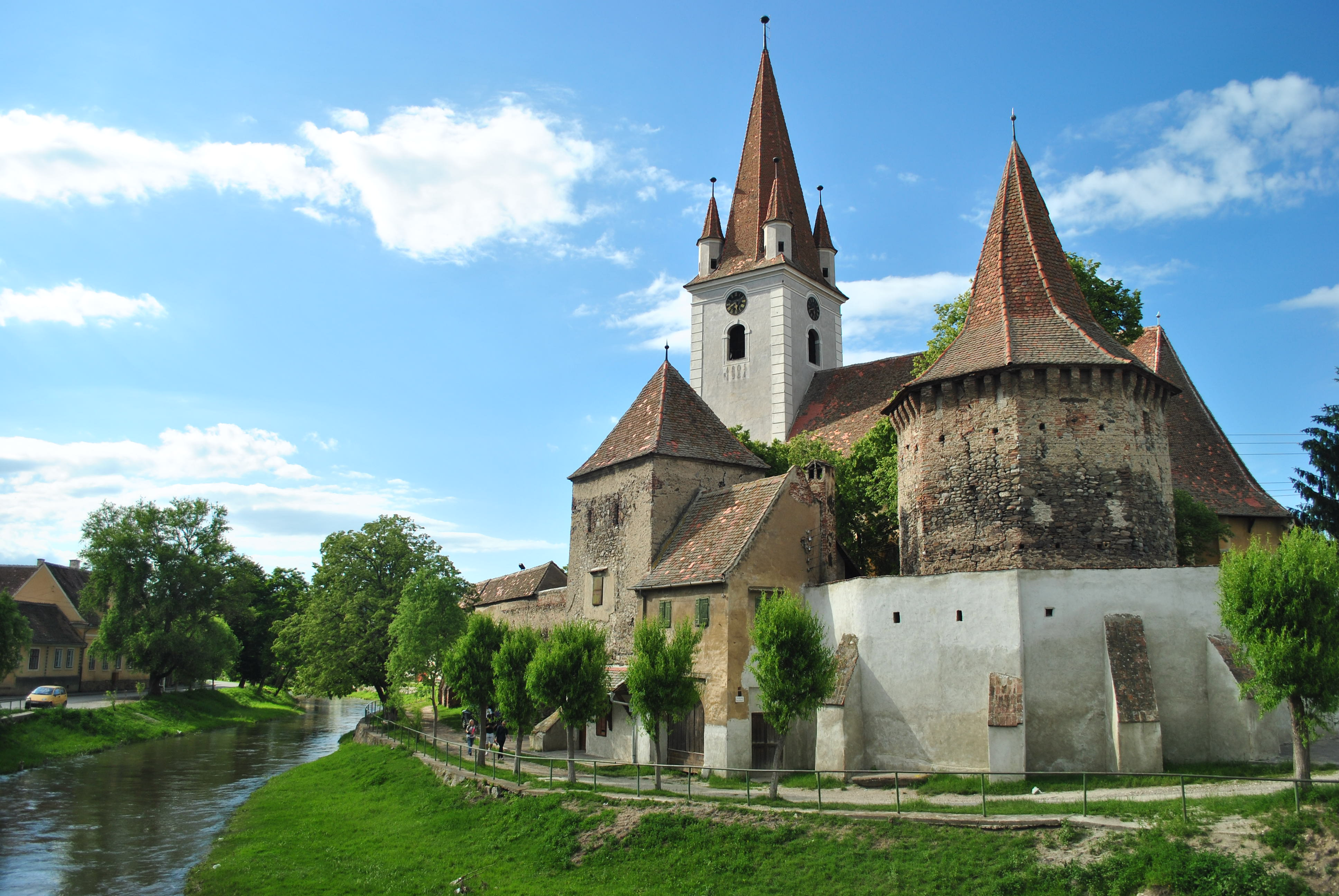 Biserica Evanghelică Fortificată din Cristian, județul Sibiu, Romania